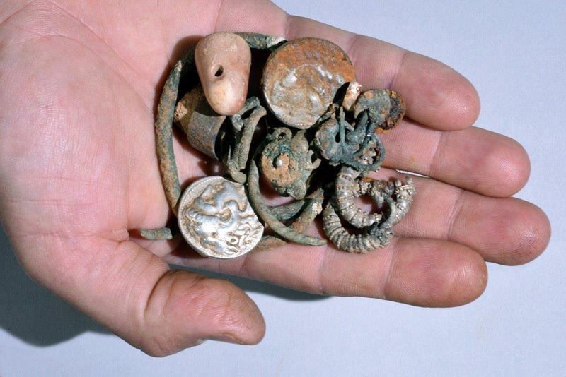 2 מטבעות של אלכסנדר מוקדון, שלוש טבעות, ארבעה צמידים, 2 עגילים מעוטרים, 3 עגילים נוספים (ככל הנראה עשויים כסף), ומשקולת אבן קטנה שנמצאו במערת נטיפים בצפון ישראל